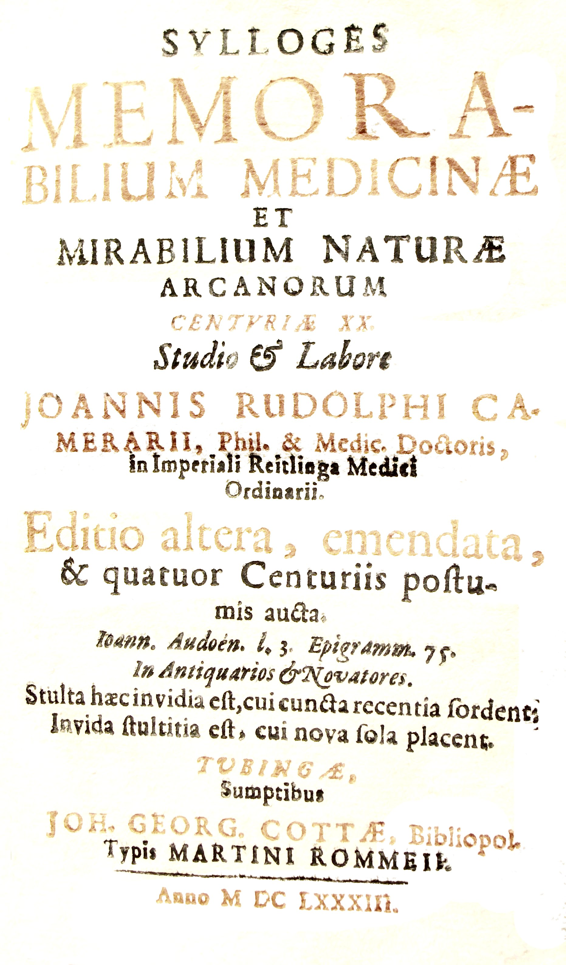 Strona tytułowa Sylloges memorabilium medicinae et mirabilium naturae arcanorum, centuriae ... wydanie drugie z 1683 r.